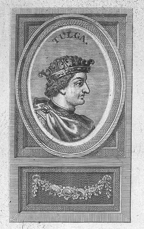 Tulga (? - 642), Rey de los visigodos (639/640 - 642).